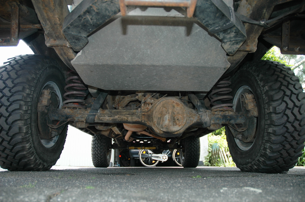 Starrachse eines Range Rover Classics